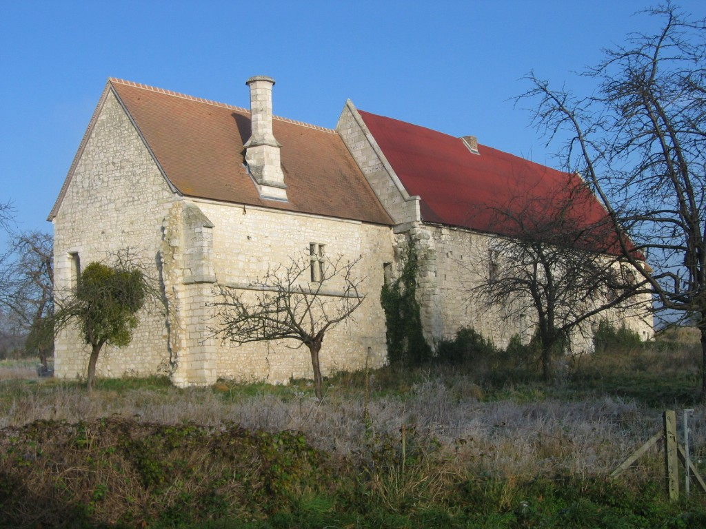 Manoir du Mesnil-sous-Jumièges.